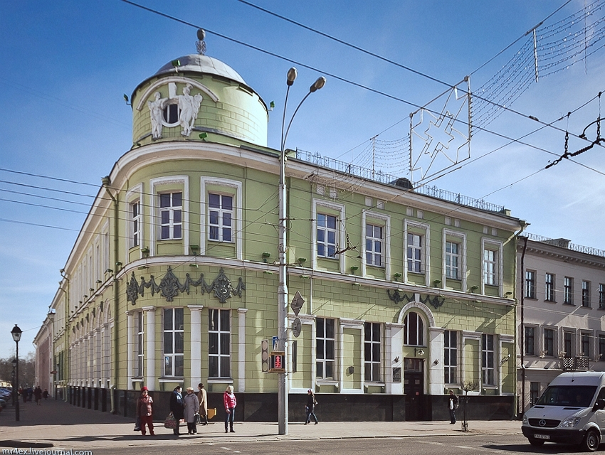 Гістарычны цэнтр Гомеля